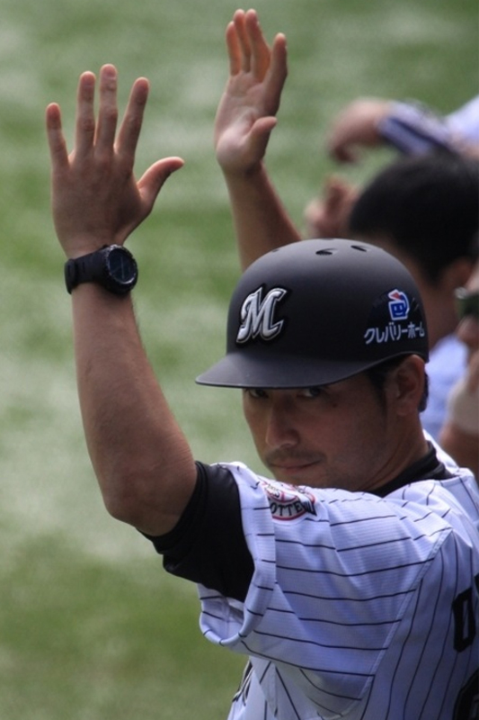 日本プロ野球 千葉ロッテマリーンズ 大塚明コーチ